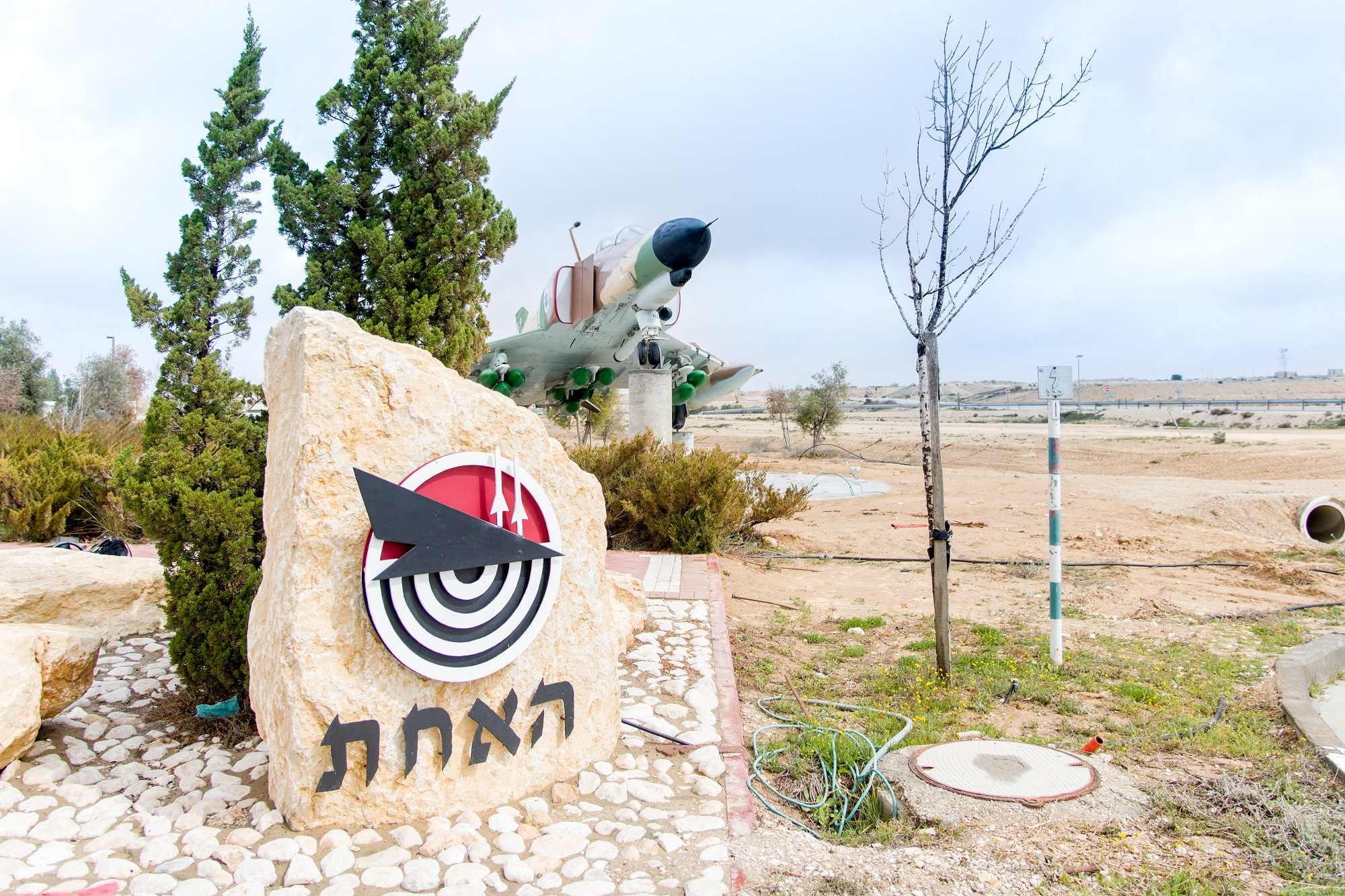 מטוס קורנס בטייסת 201